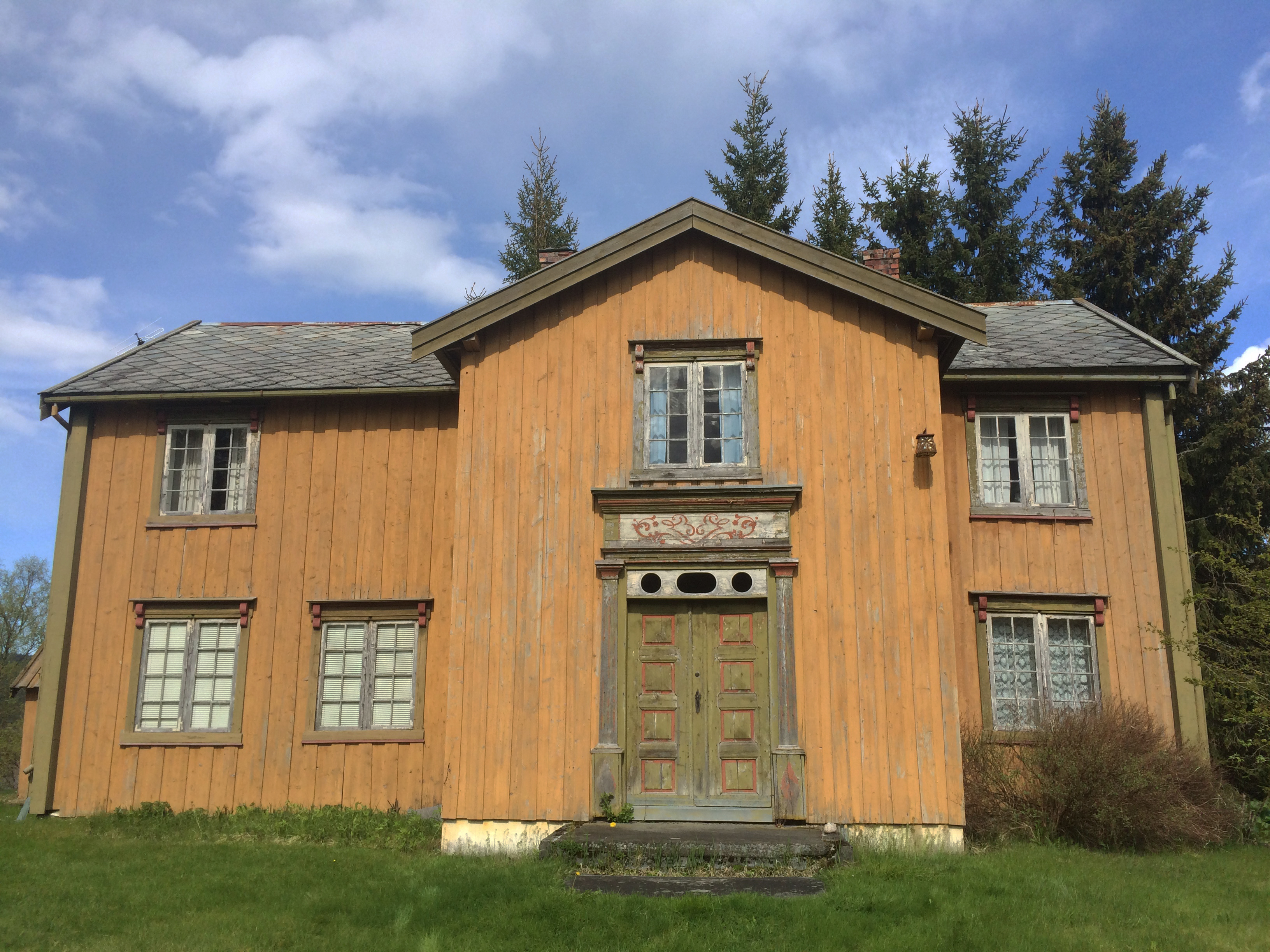 Sidebygningen, "litjstu" på gården Gjesvål i Orkdal